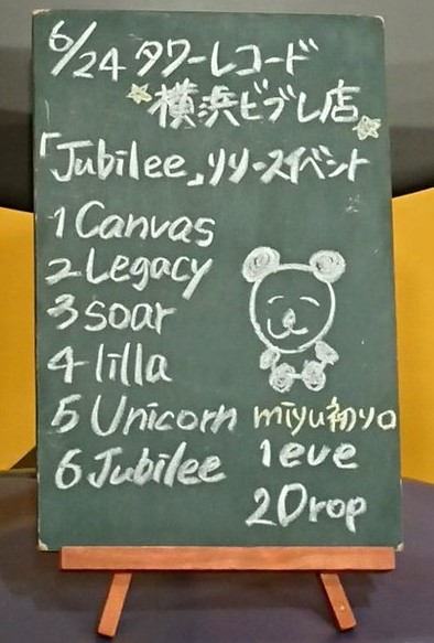 amiinAセトリボード(20180624(1))